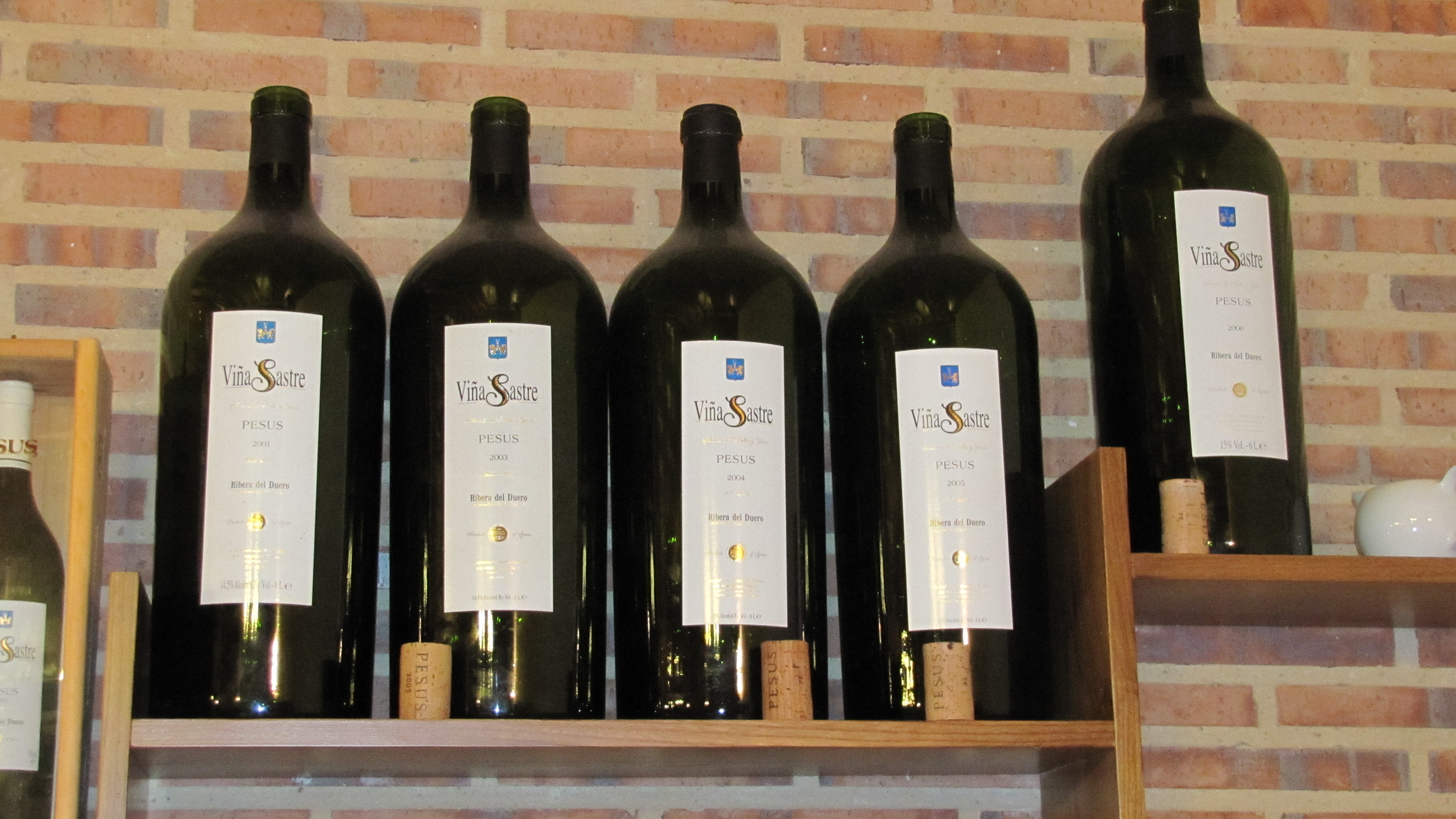 5 botellas Imperial de vino, de 6 litros cada una, en una estanteria. Las 5 botellas son de Pesus de la Bodega Viña Sastre - Hermanos Sastre, de la Denominación de Origen Ribera del Duero, en España. Cada botella imperial es de una añada diferente, empezando por la izquierda: 2001, 2003, 2004, 2005 y la última a la derecha de 2006.